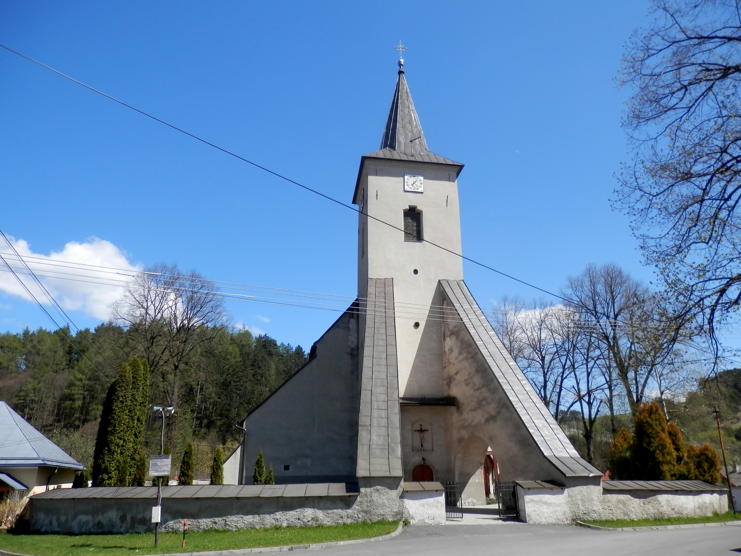 Farský kostol Nanebovzatia Panny Márie. Doba vzniku 2.polovica 14.storočia. Prevládajúci sloh gotika. Mesto Spišská Stará Ves, okres Kežmarok. Slovensko.